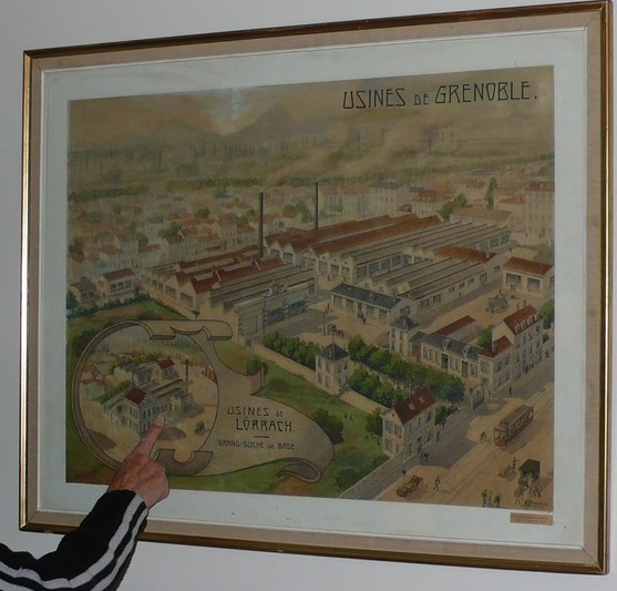 Gravure (vers 1900) sous verre exposé dans le Musée ARhome, musée privé de l'entreprise ARaymond montrant l'usine grenobloise et, dans un encart en bas à gauche, l'usine allemande.